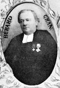 Incisione raffigurante il botanico Edouard Bérard (1825-1889) tratta da cartaceo. Scansione: Società della flora valdostana.